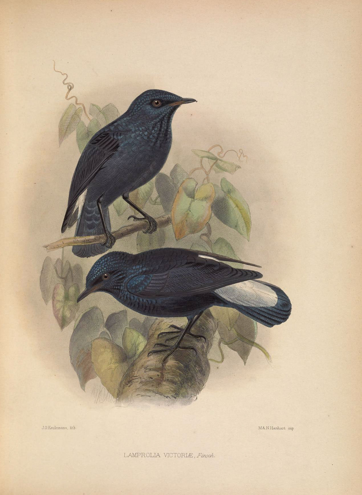 JGiieulemans, Ktli^ M S^N .Hssmha.vt imp LAMPROLIA MCTORLE, J^iTis^a^.